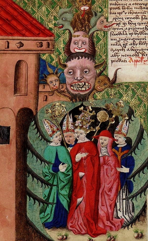 Katoličtí preláti (papež, kardinál, biskupové) v objetí apokalyptické šelmy.